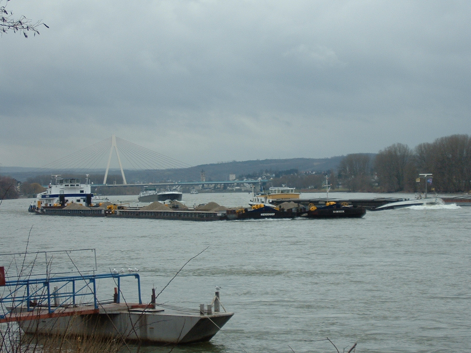 Schubverband mit 4 Leichtern zu Tal F.Lang eig.Bild 24.02.07